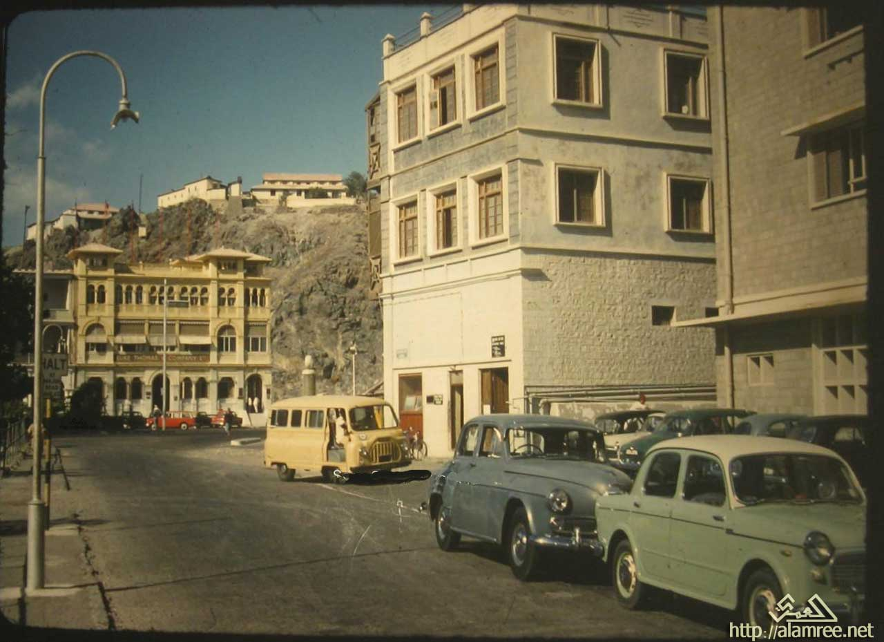 عدن التواهي 1959